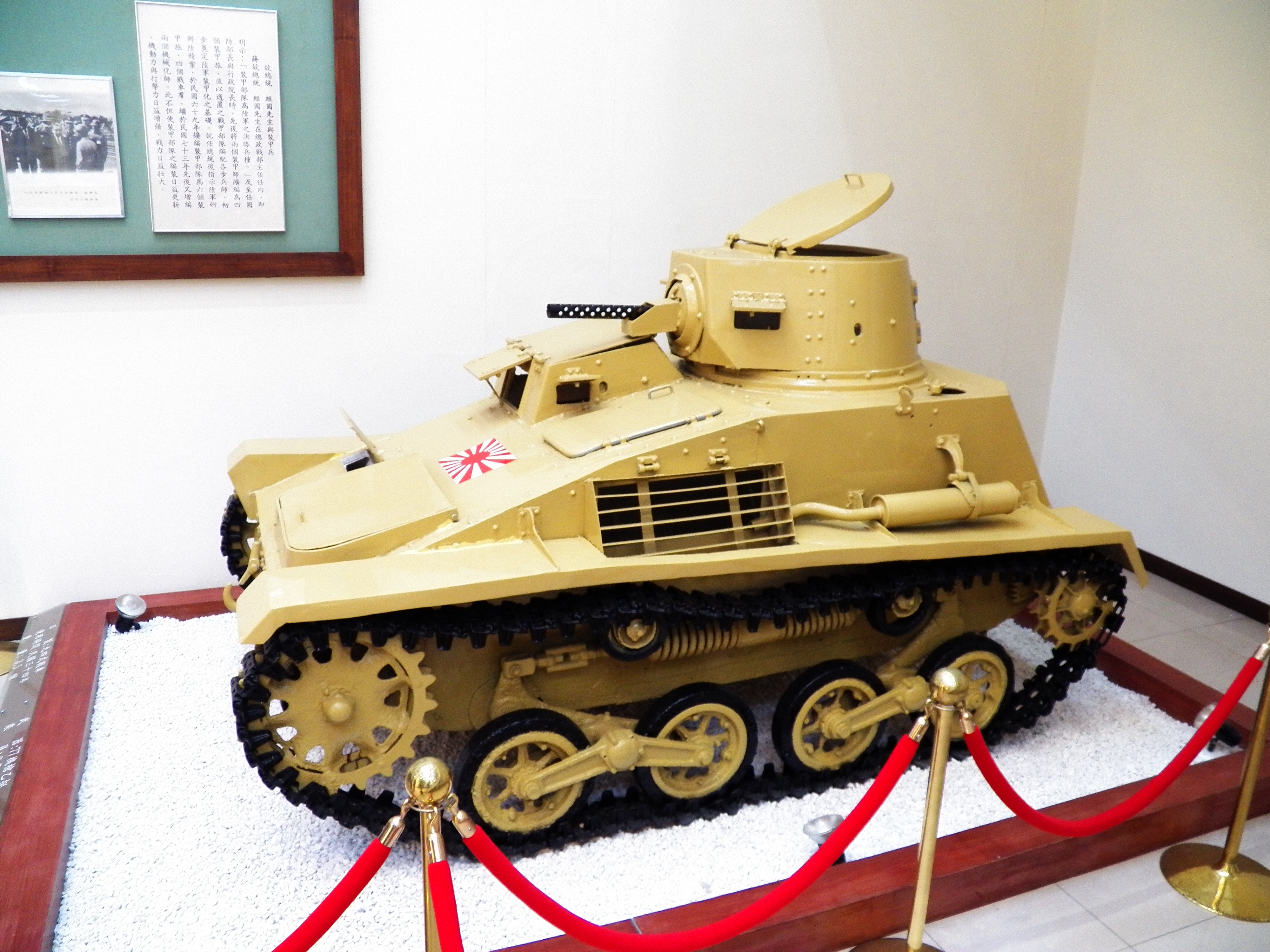 裝甲兵學校校史館一樓展示的日本陸軍九四式輕裝甲車左側。